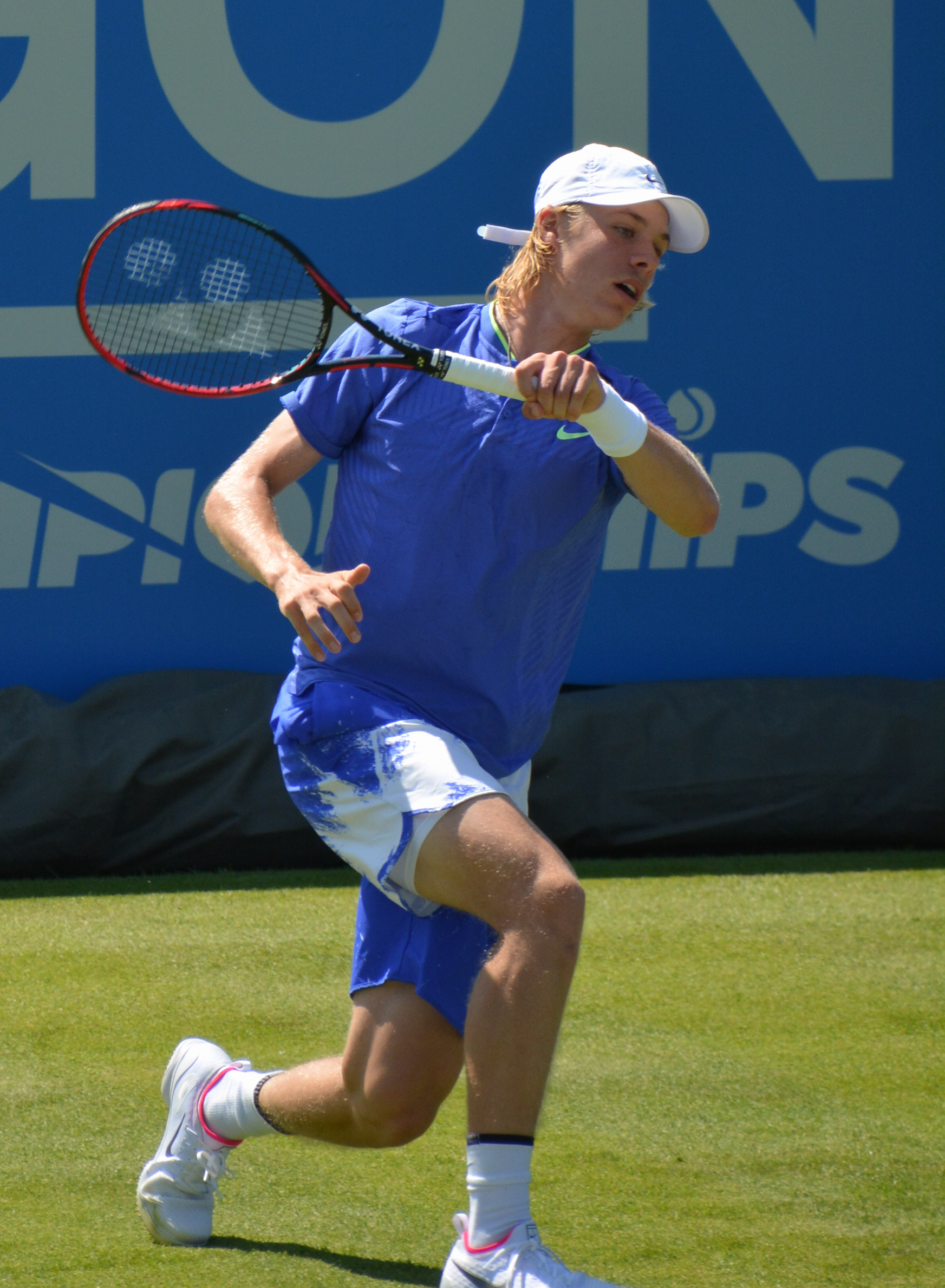 Denis Shapovalov